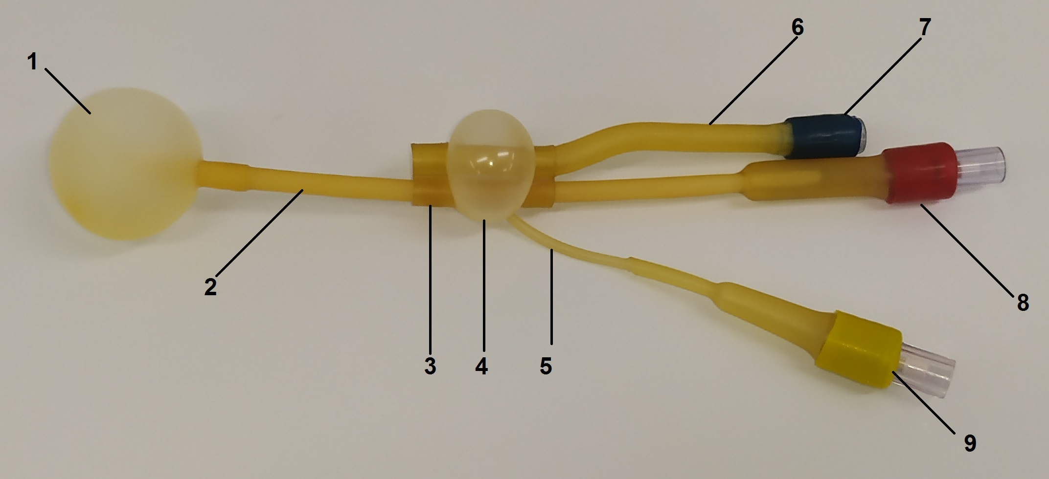 Схема устройства ЯМИК-катетера